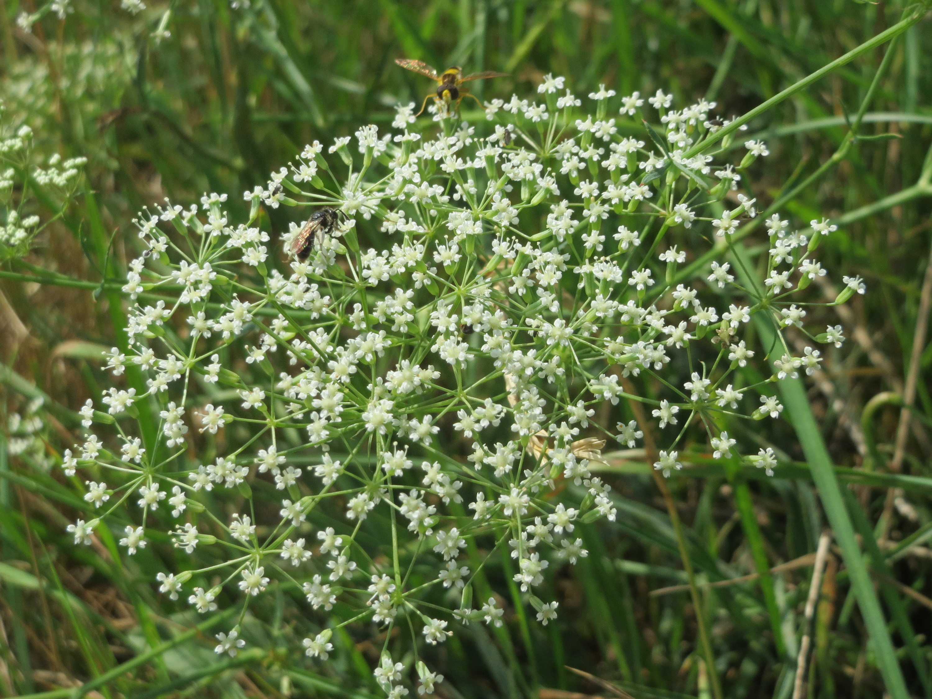 Gemeine Sichelmöhre (Falcaria vulgaris) bei Wiesbaden-Nordenstadt